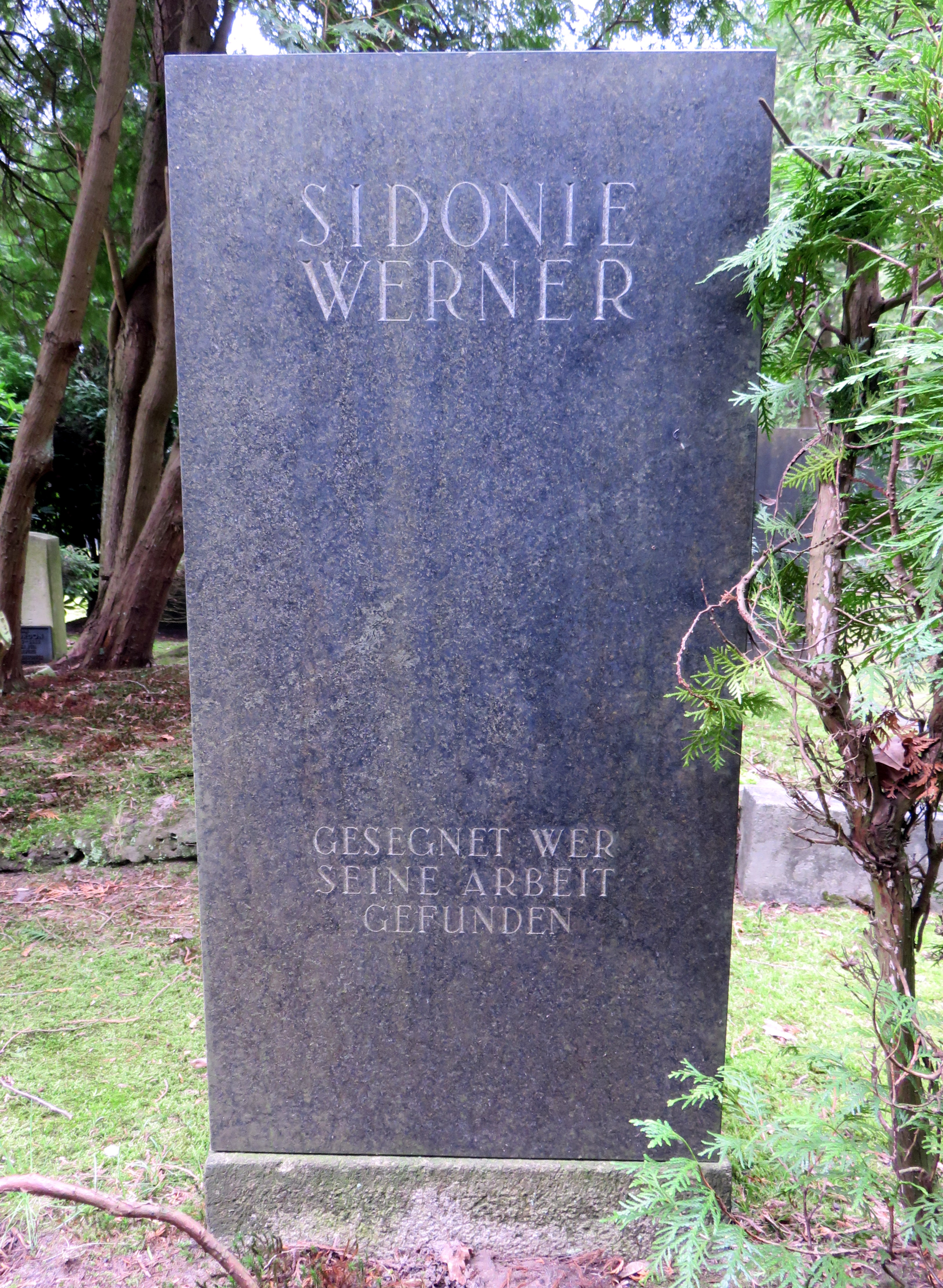 Grab der Hamburger Politikerin und Mitbegründerin des Jüdischen Frauenbundes, Sidonie Werner, Jüdischer Friedhof Ohlsdorf, Ilandkoppel, Planquadrat L 1.